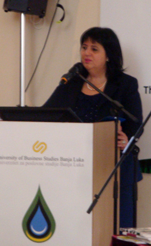 Сребренка Голић